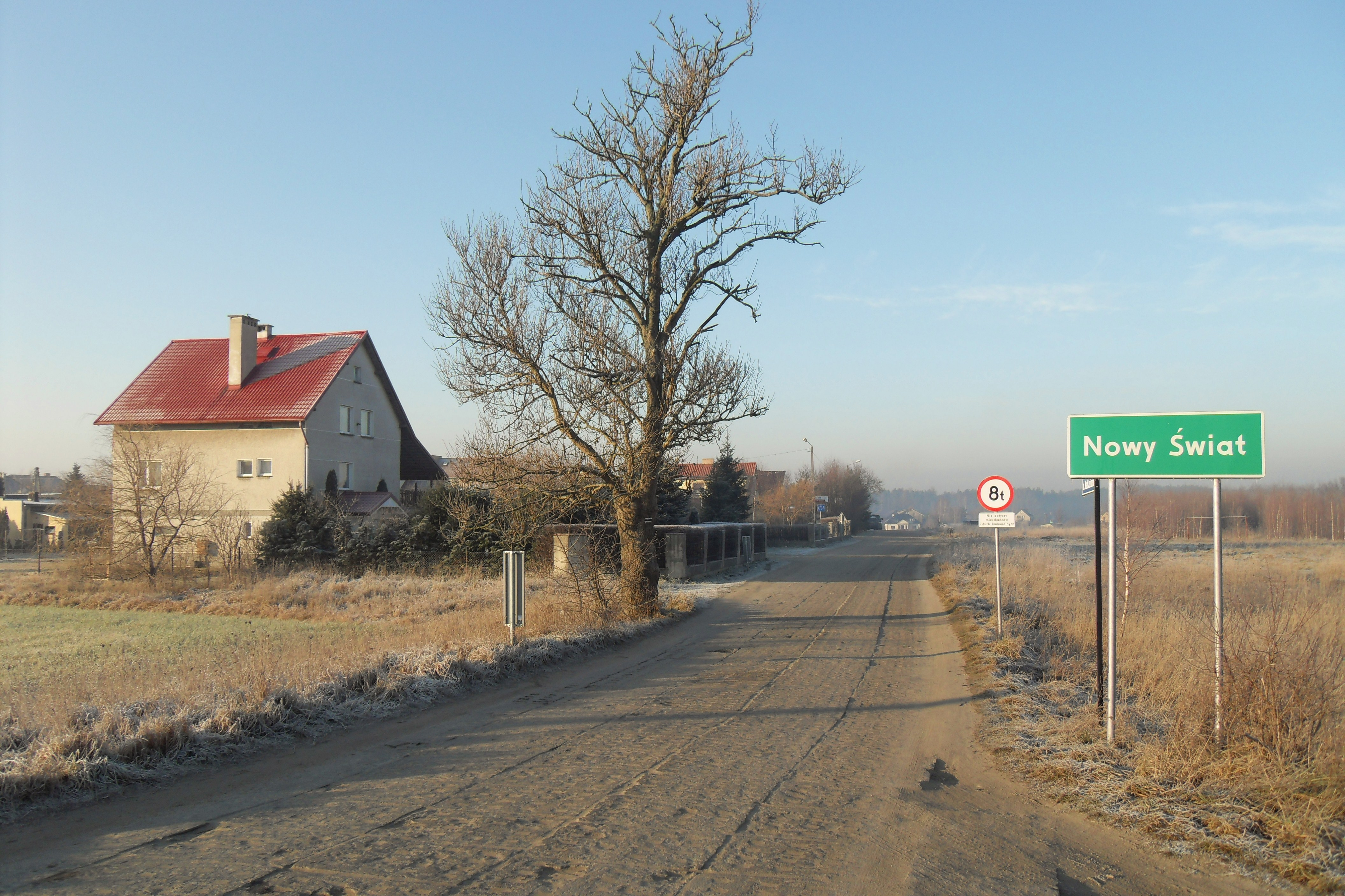 Nowy Świat (województwo pomorskie, gmina Żukowo).